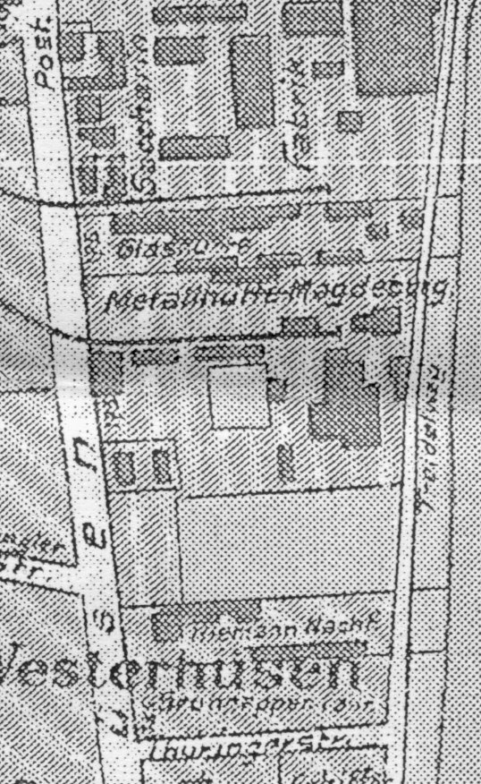 Karte vom Bereich um die Glas- und die Metallhütte nördlich von Westerhüsen